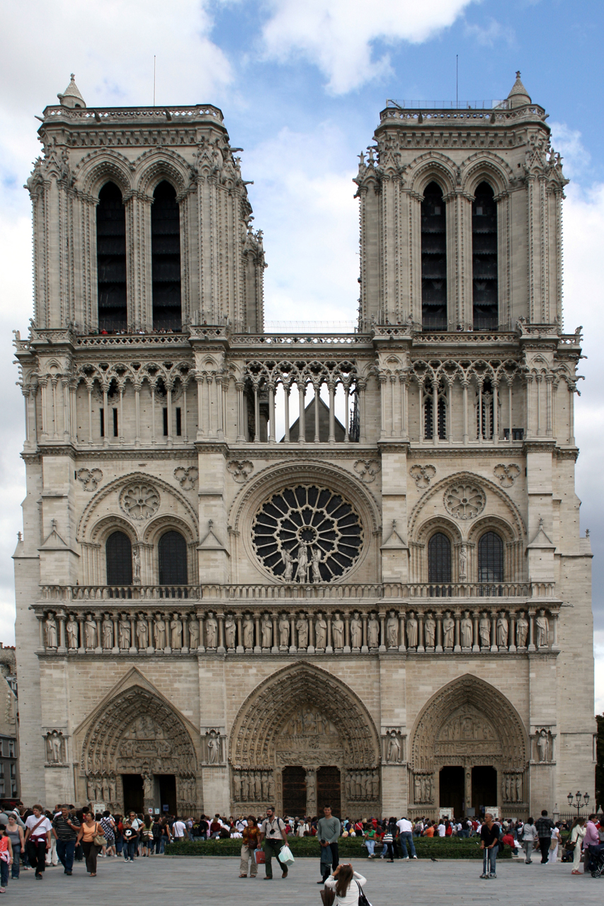 Notre-Dame de Paris